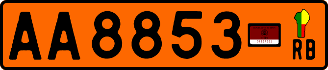 Схематичне зображення номерного знаку